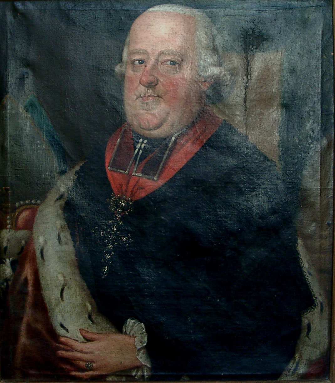 Letzter Würzburger Füstbischof von Fechenbach, Museum im Deutschordensschloss Münnerstadt